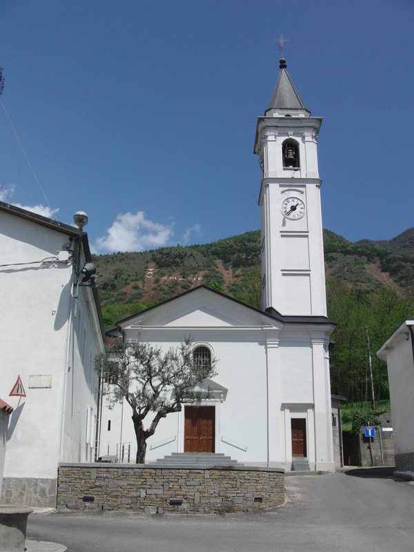 Cappelle e Piloni di Almese